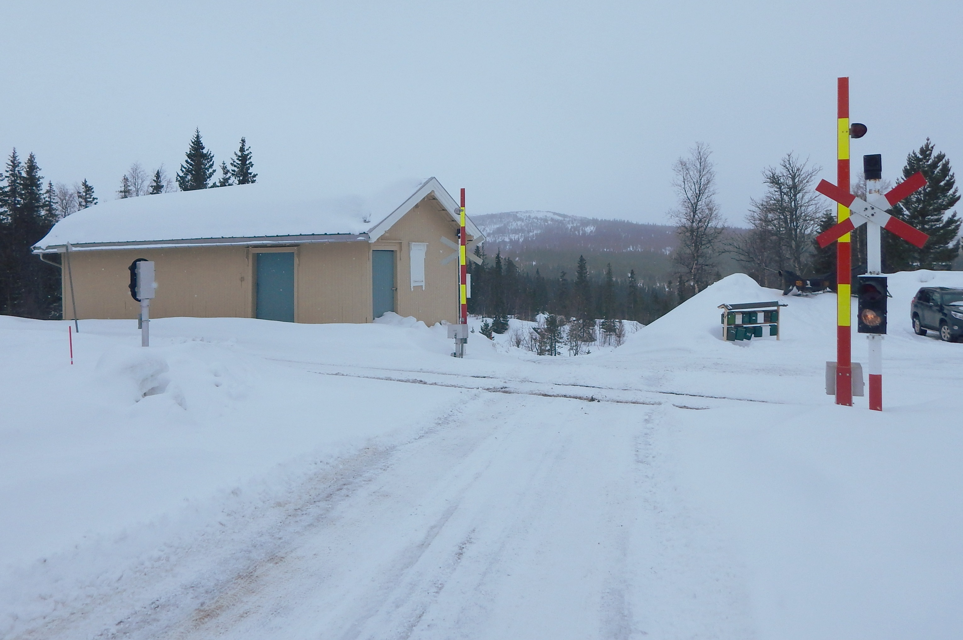 Reitvegen ved Reitan stasjon. Fylkesveien ender rett nedenfor stasjonen.